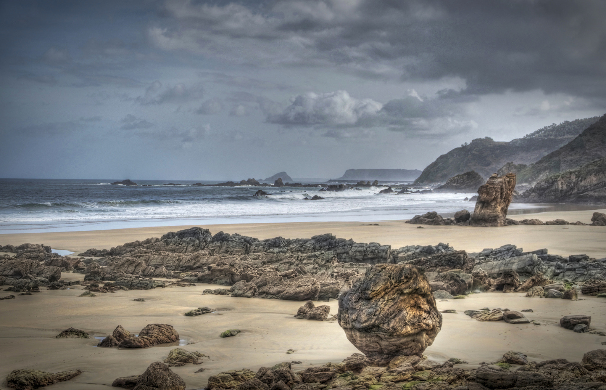 500px provided description: Playa Del Aguilar Asturias